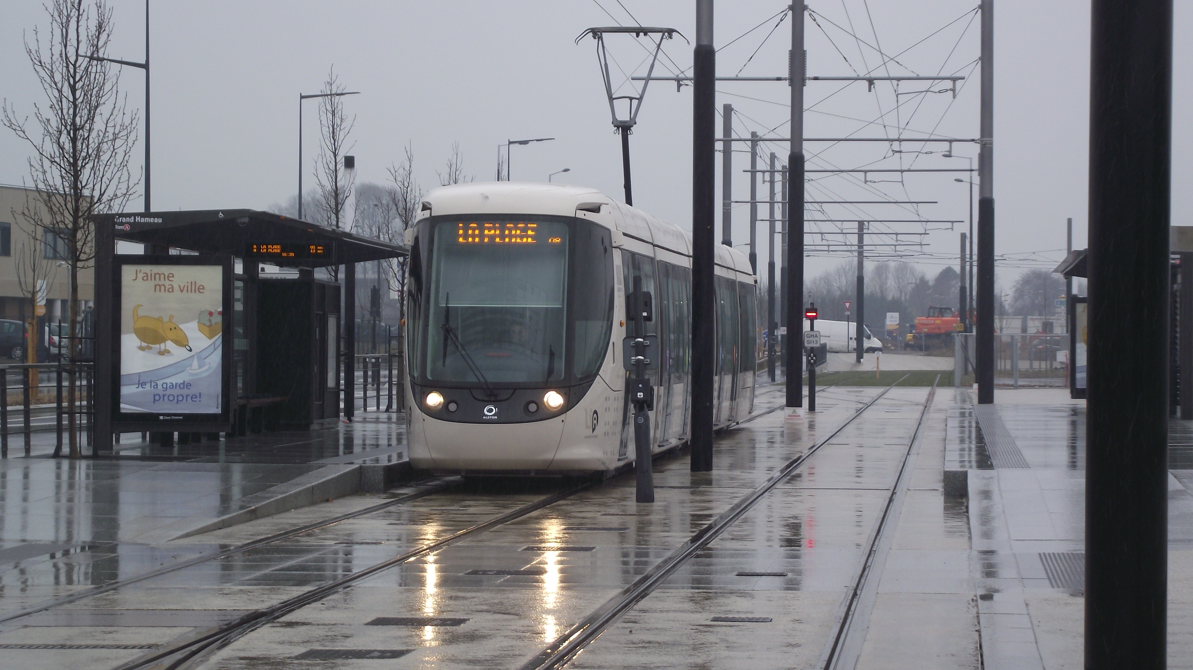 Tram in Le Havre bij eindhalte Grand Hameau